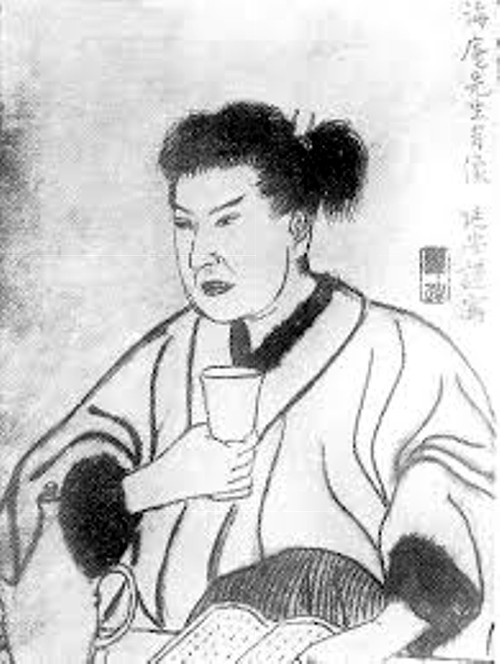 多田海庵先生肖像 延安謹写